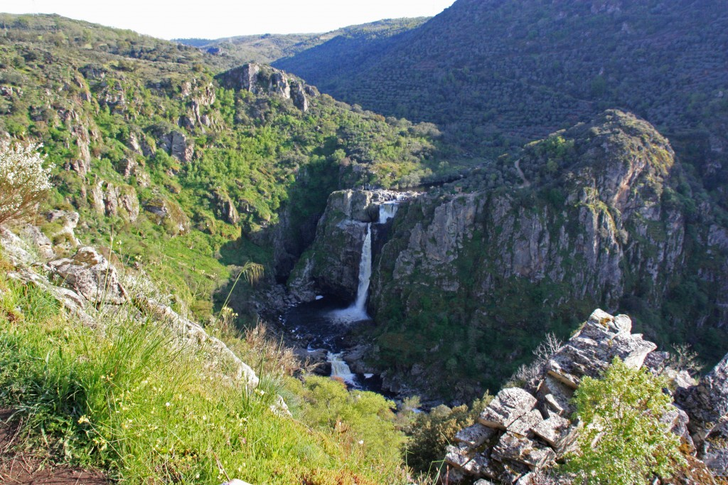 Pozo de los Humos, Salamanca